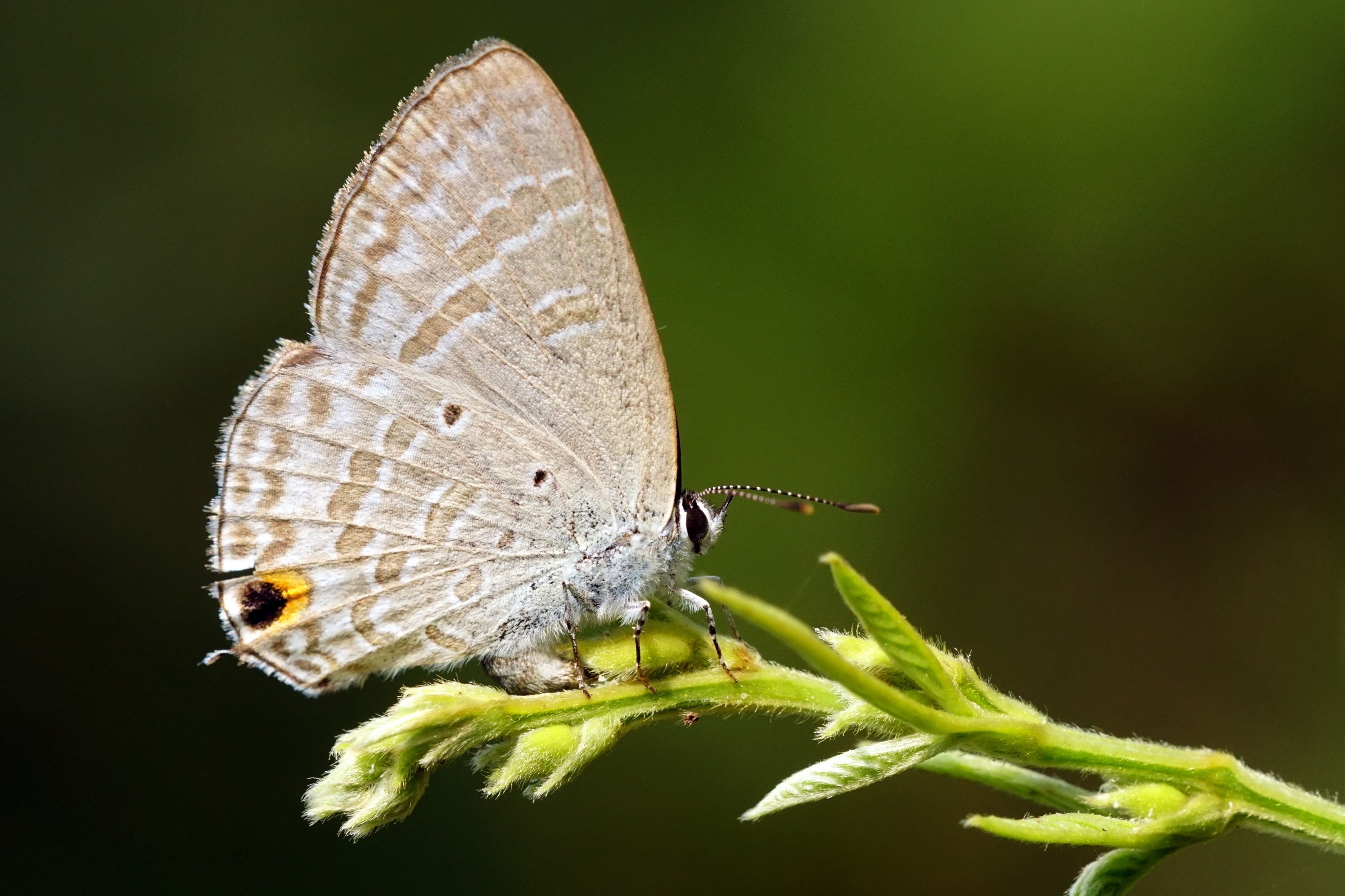 青珈波灰蝶 Catochrysops panormus exiguus